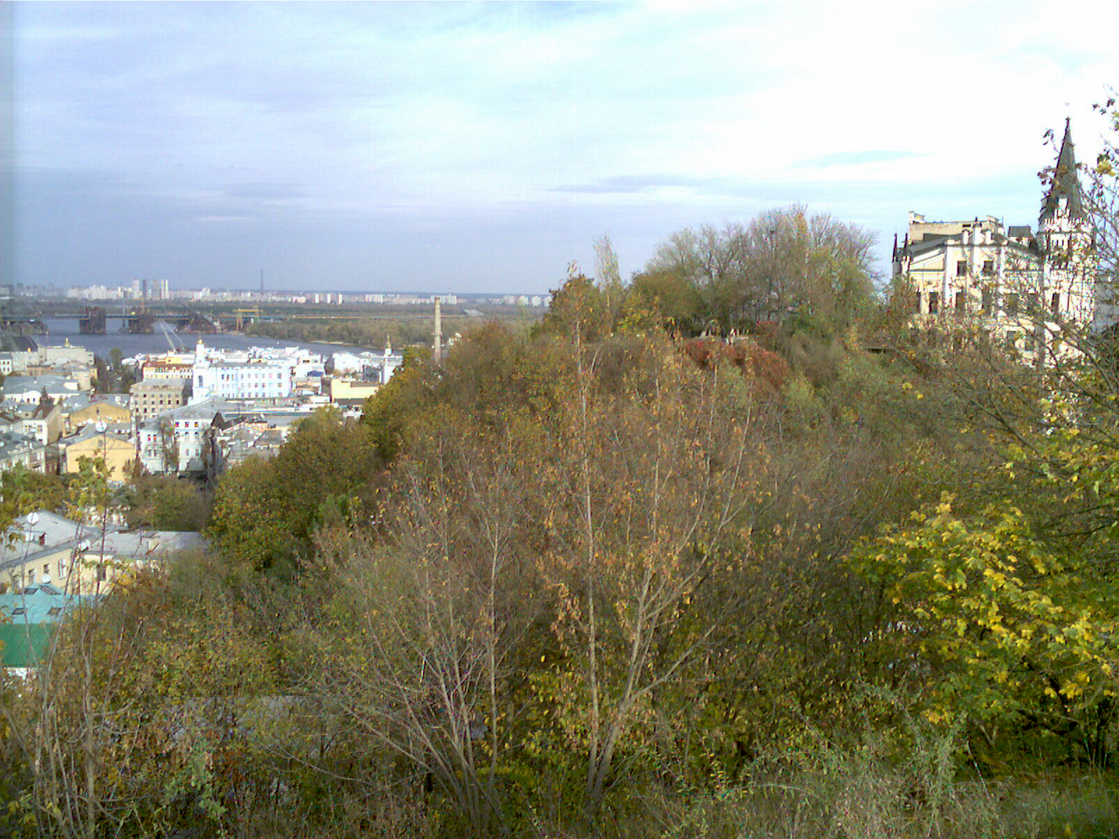 Вид з Замкової гори на гору Уздихальниця, "замок Річарда Левове Сердце", Поділ, Дніпро, майбутній міст